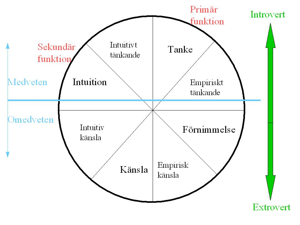 CG Jung - Personlighetstyper.